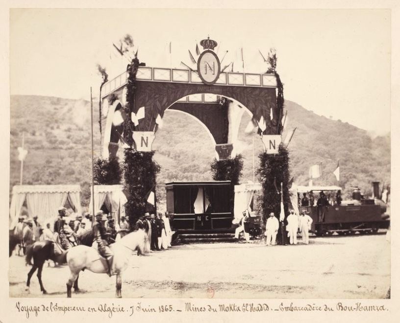 Voyage de l' Empereur en Algérie, Mines du Mokta el Hadid, Embarcadère du Bou-Hamra, 7 juin 1865.